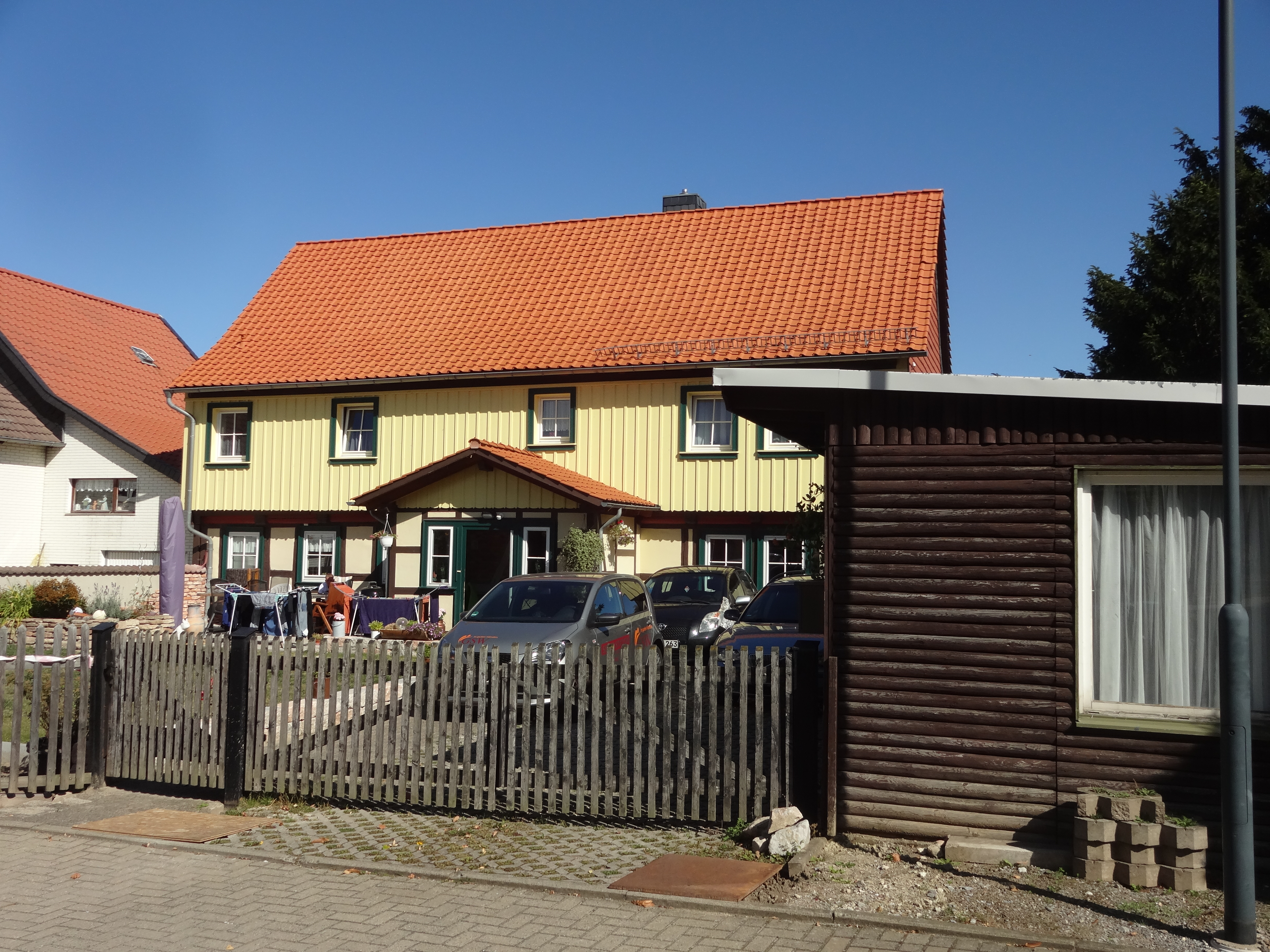 denkmalgeschütztes Wohnhaus in der Schulstraße 13 in Drübeck